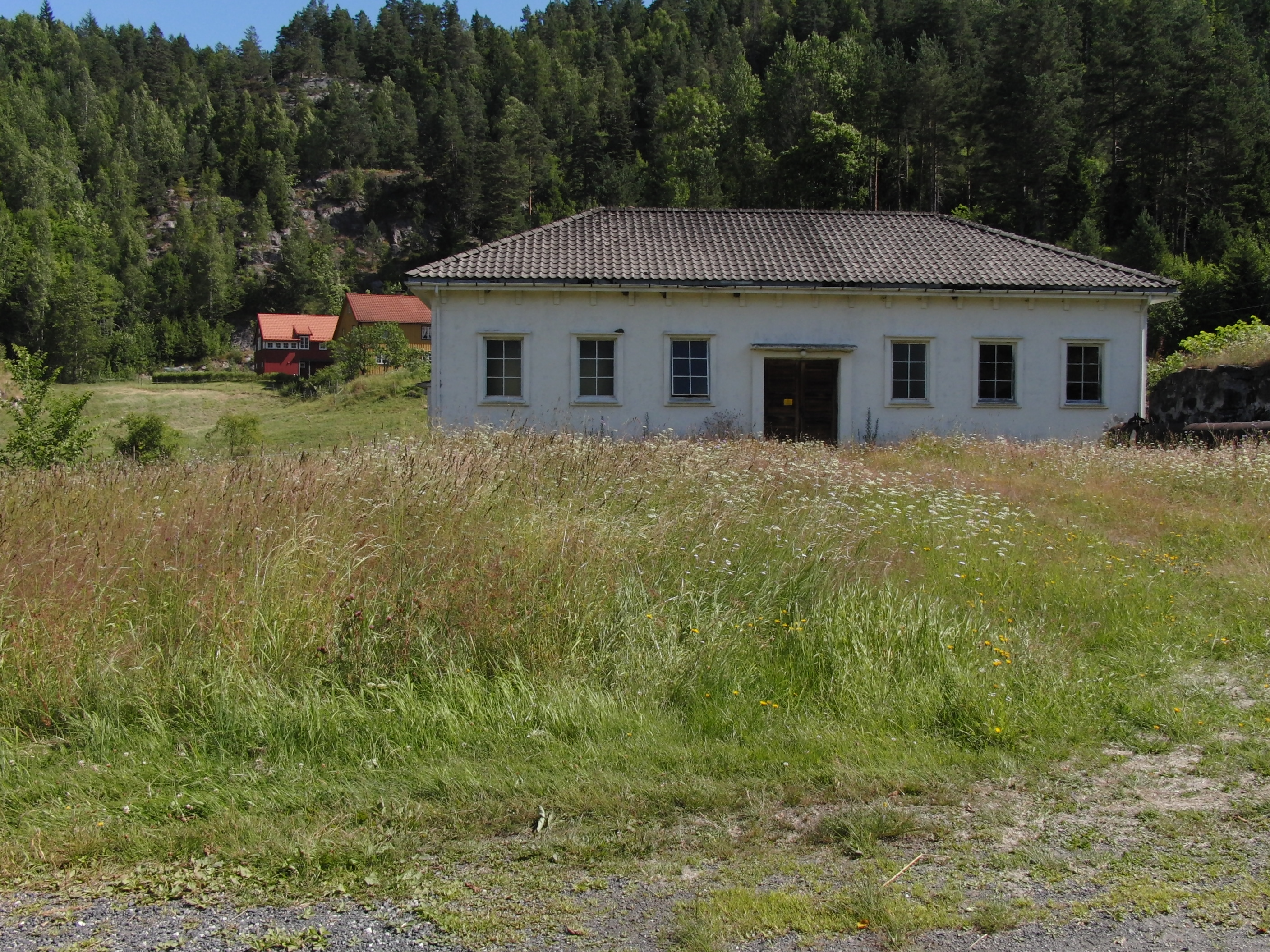 Eikeland Verk kraftverk